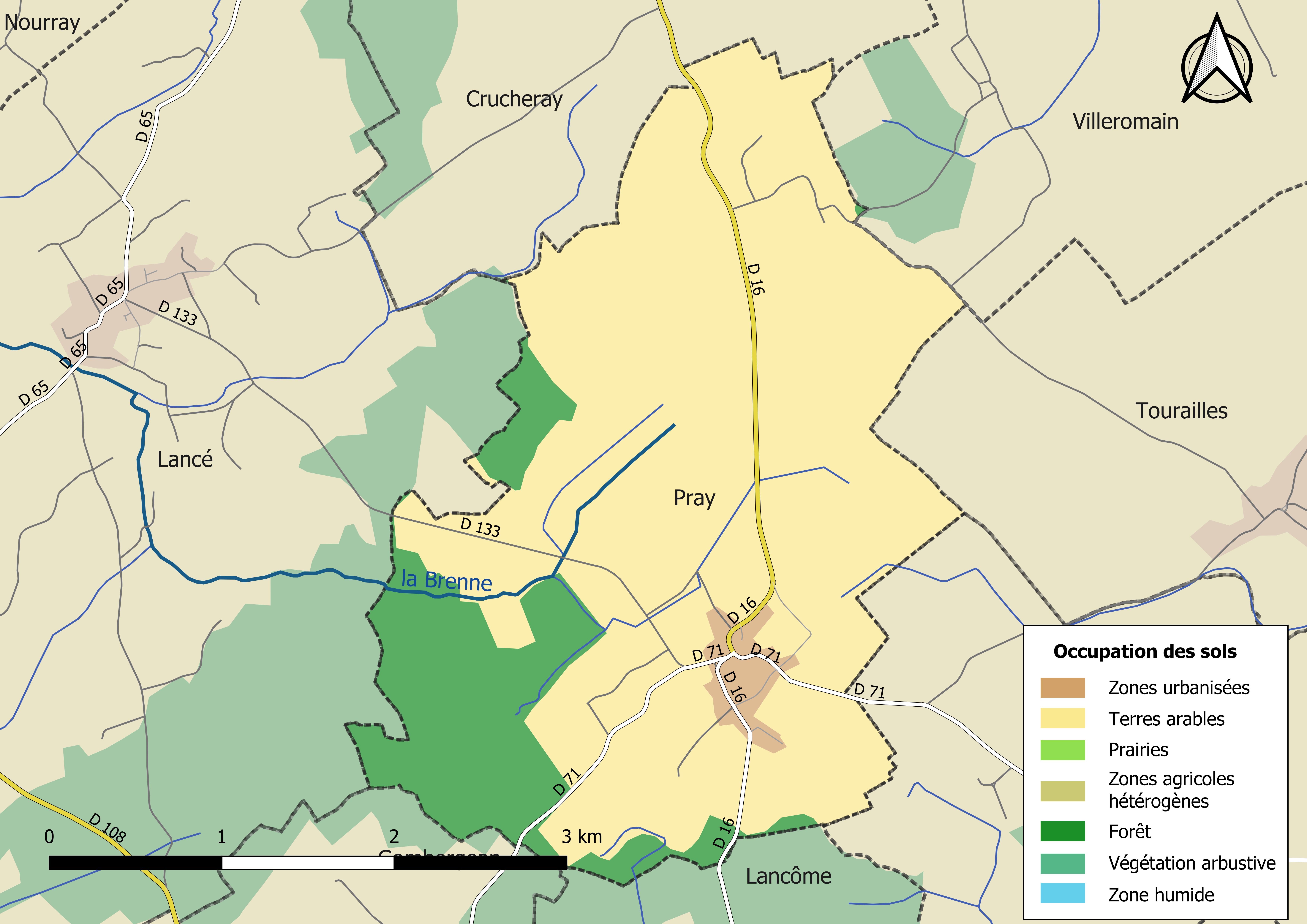 Carte des infrastructures et de l’occupation des sols en 2018 de la commune de Pray (France).